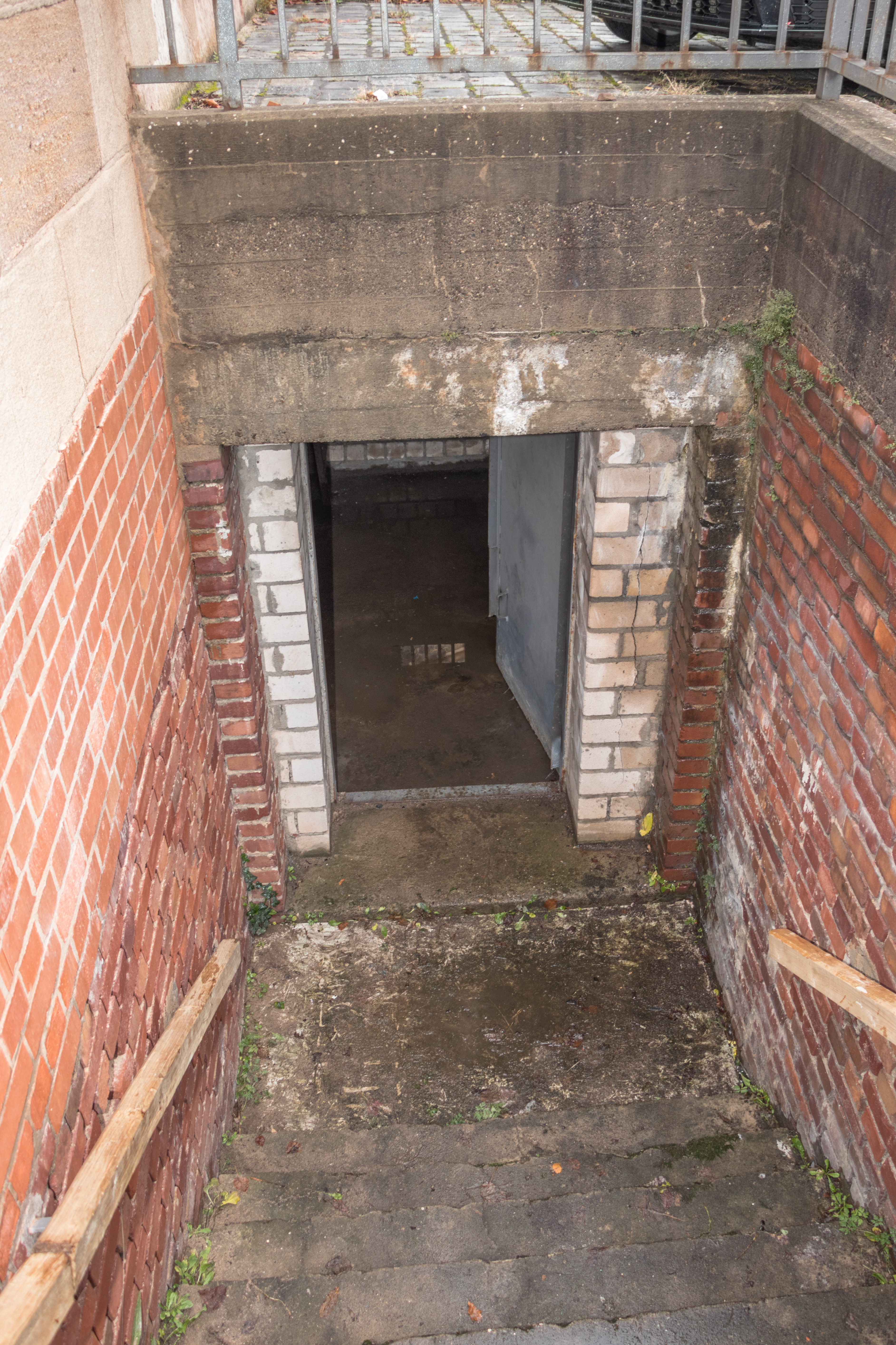 Laufertorkeller, Laufertorbunker, Eingang, Treppe, Äußerer Laufer Platz